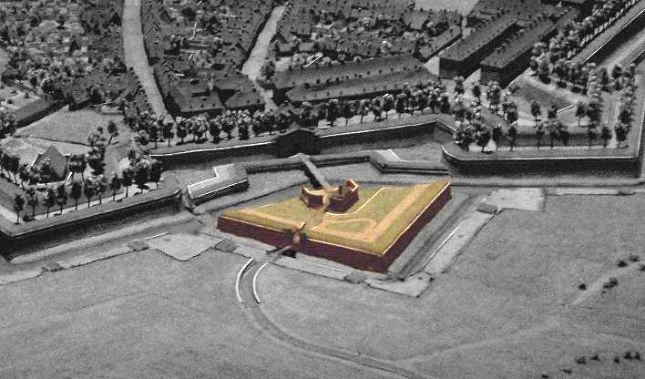 Une demi-lune, sur le plan relief de Ménine